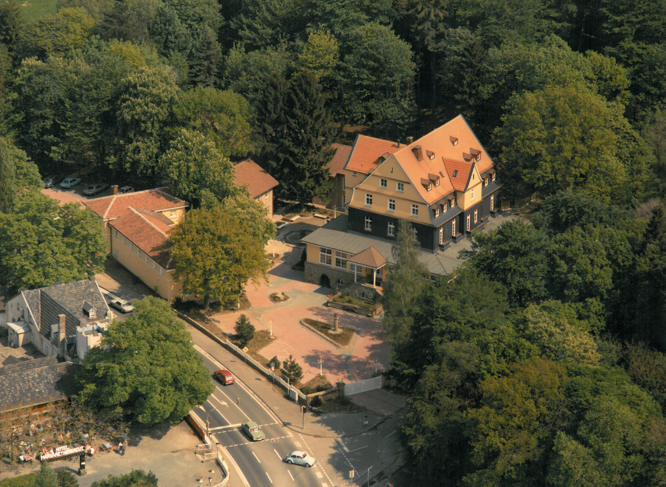 Luftbild des Margarethenhofs.